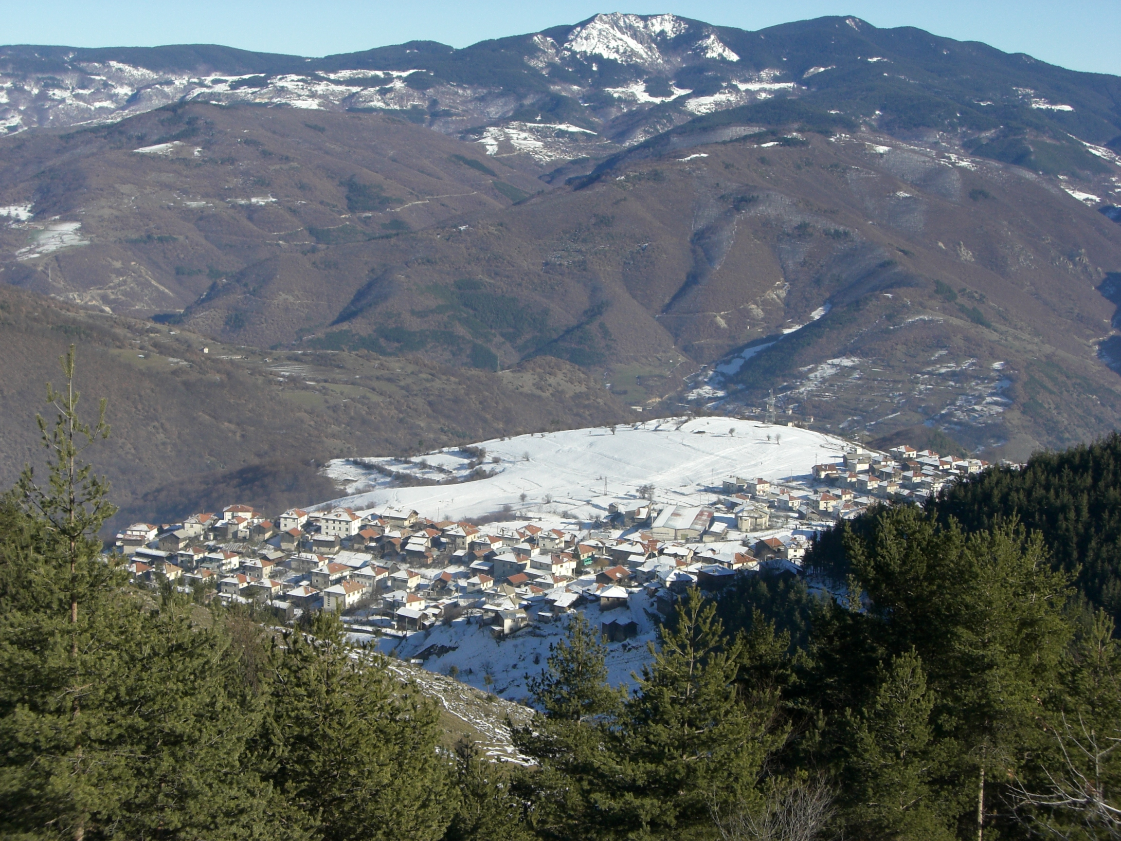 с.Селча - кв.Чарква